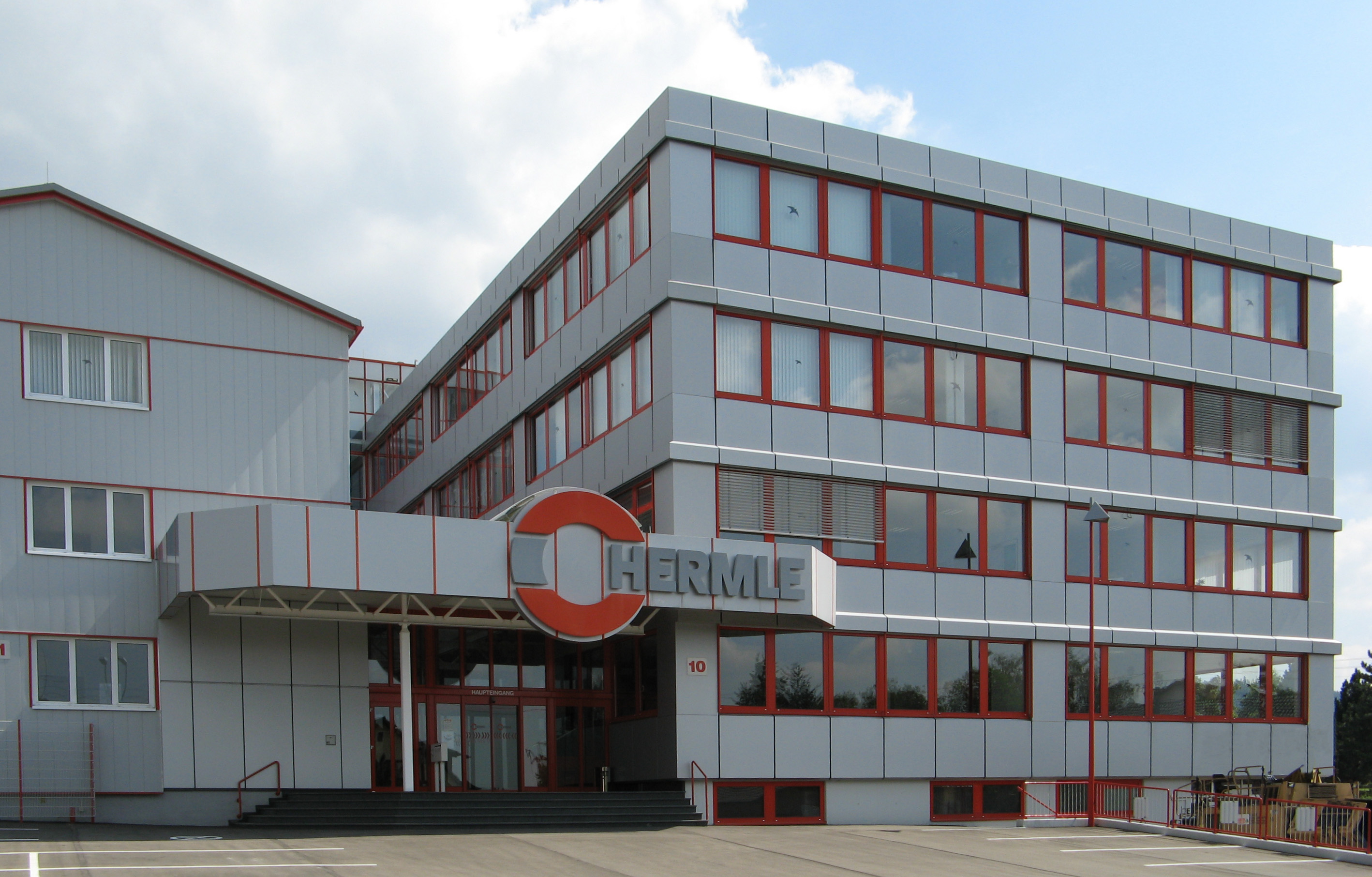 Hauptgebäude der Hermle AG in 78559 Gosheim Main building of Hermle AG in Gosheim, Germany